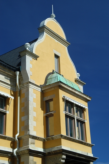 Prächtiges, altes Stadthaus in Falun